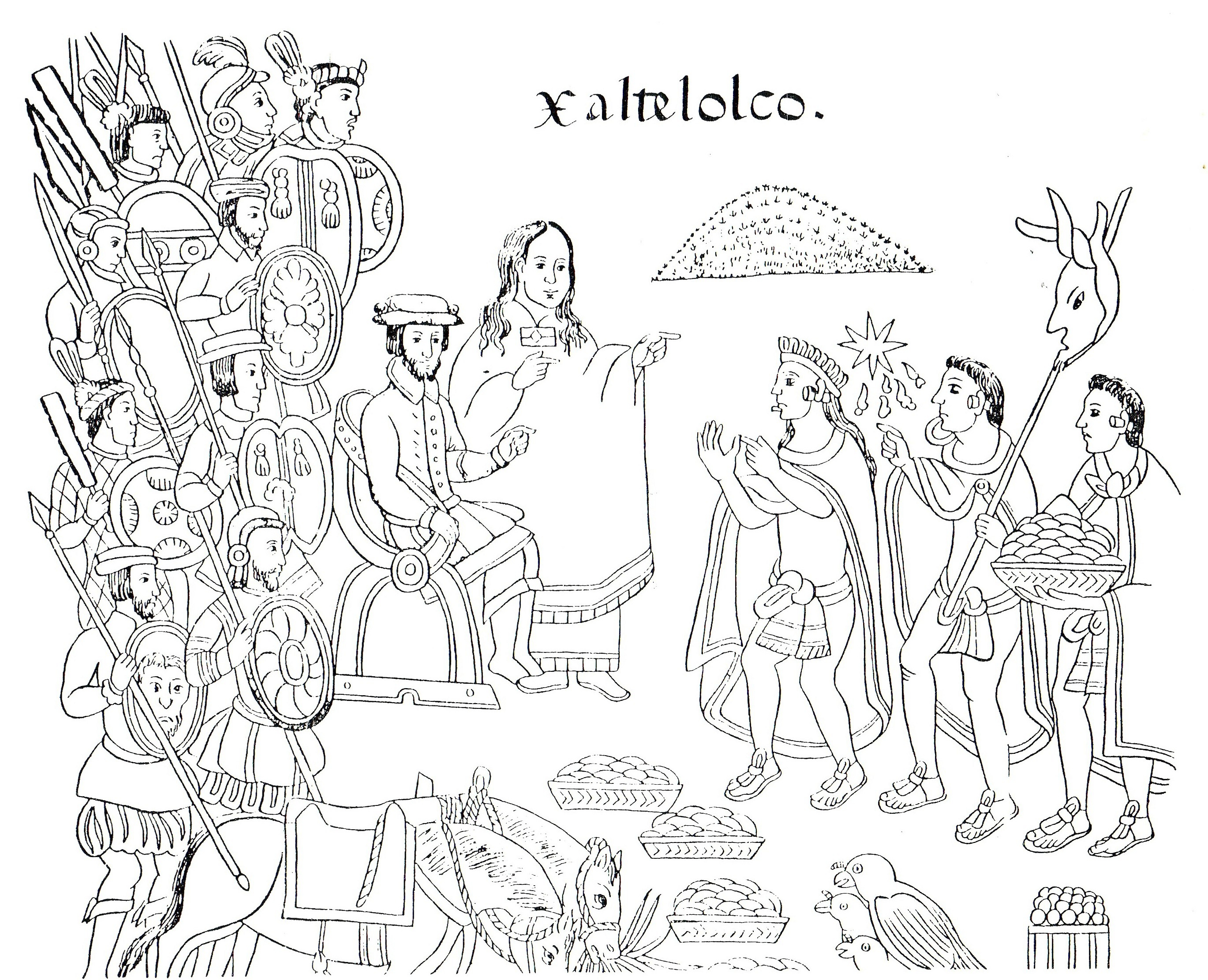 Die Eroberung Mexikos: La Malinche und Hernán Cortés Altmexikanische Bilderhandschrift der Tlaxcalteken aus dem 16. Jahrhundert (Lienzo de Tlaxcala). Diego Muñoz Camargo, c. 1585.